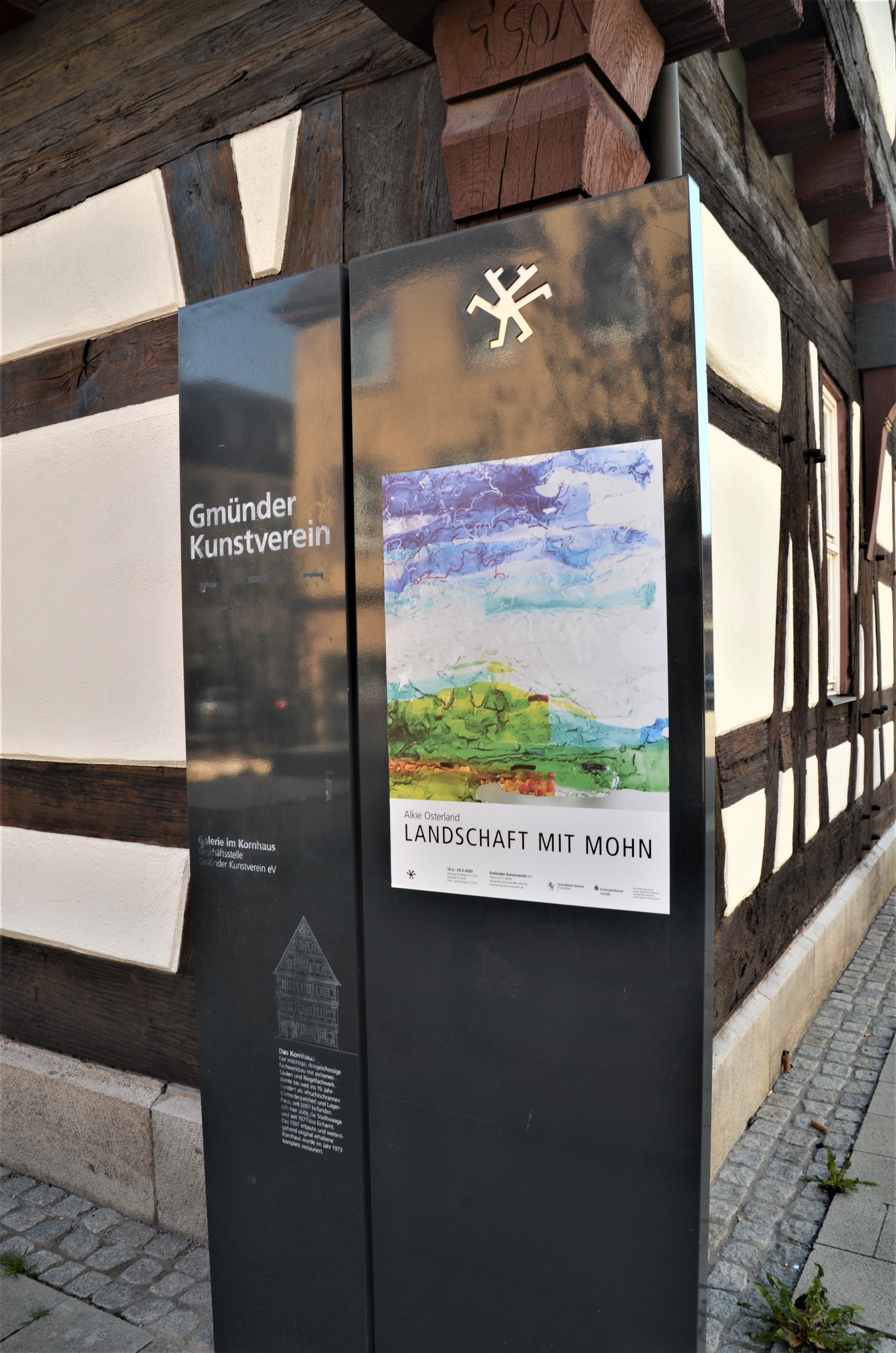 Hinweisschild des Gmünder Kunstvereins am Kornhaus in Schwäbisch Gmünd